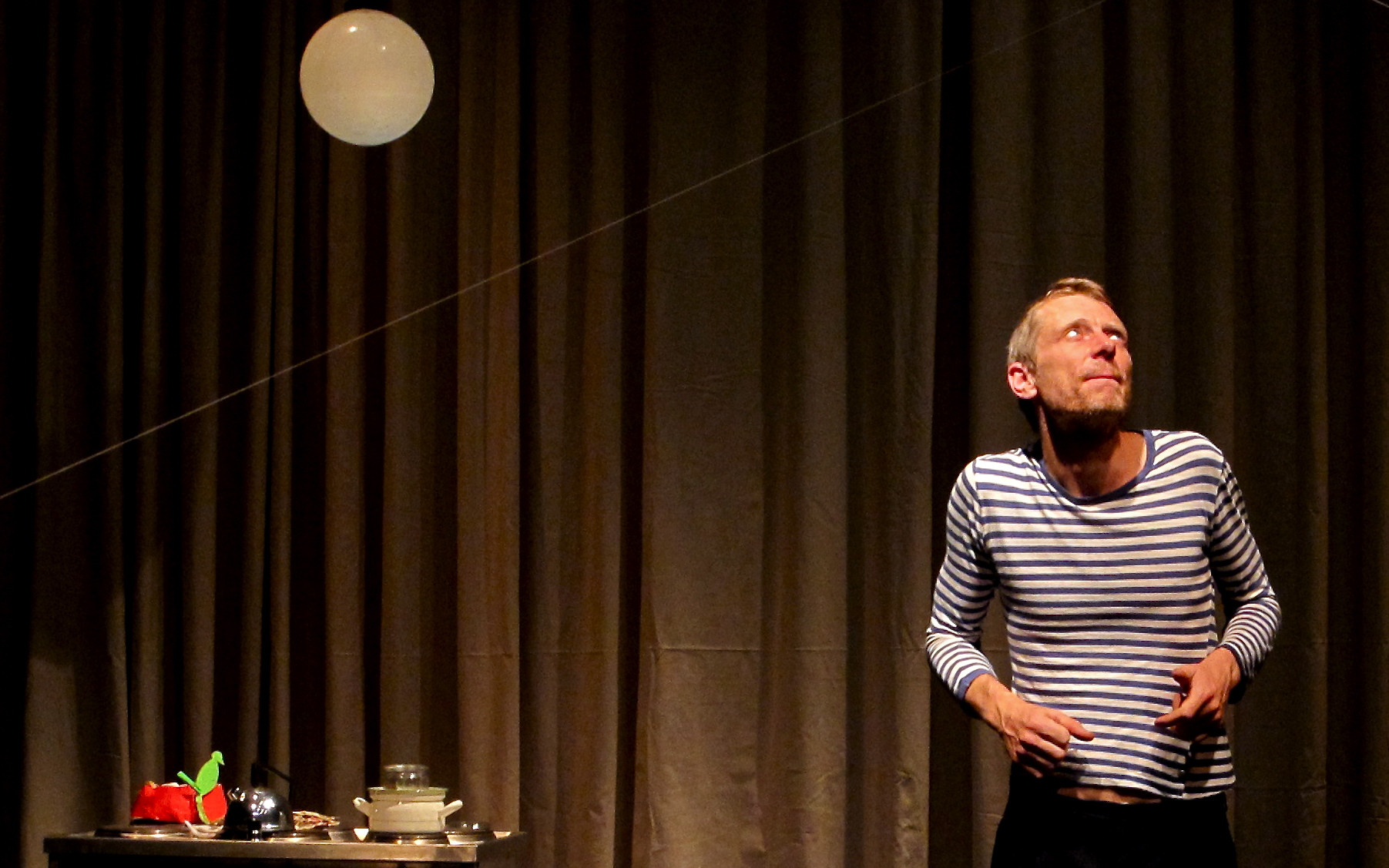 Benjamin Verdonck.